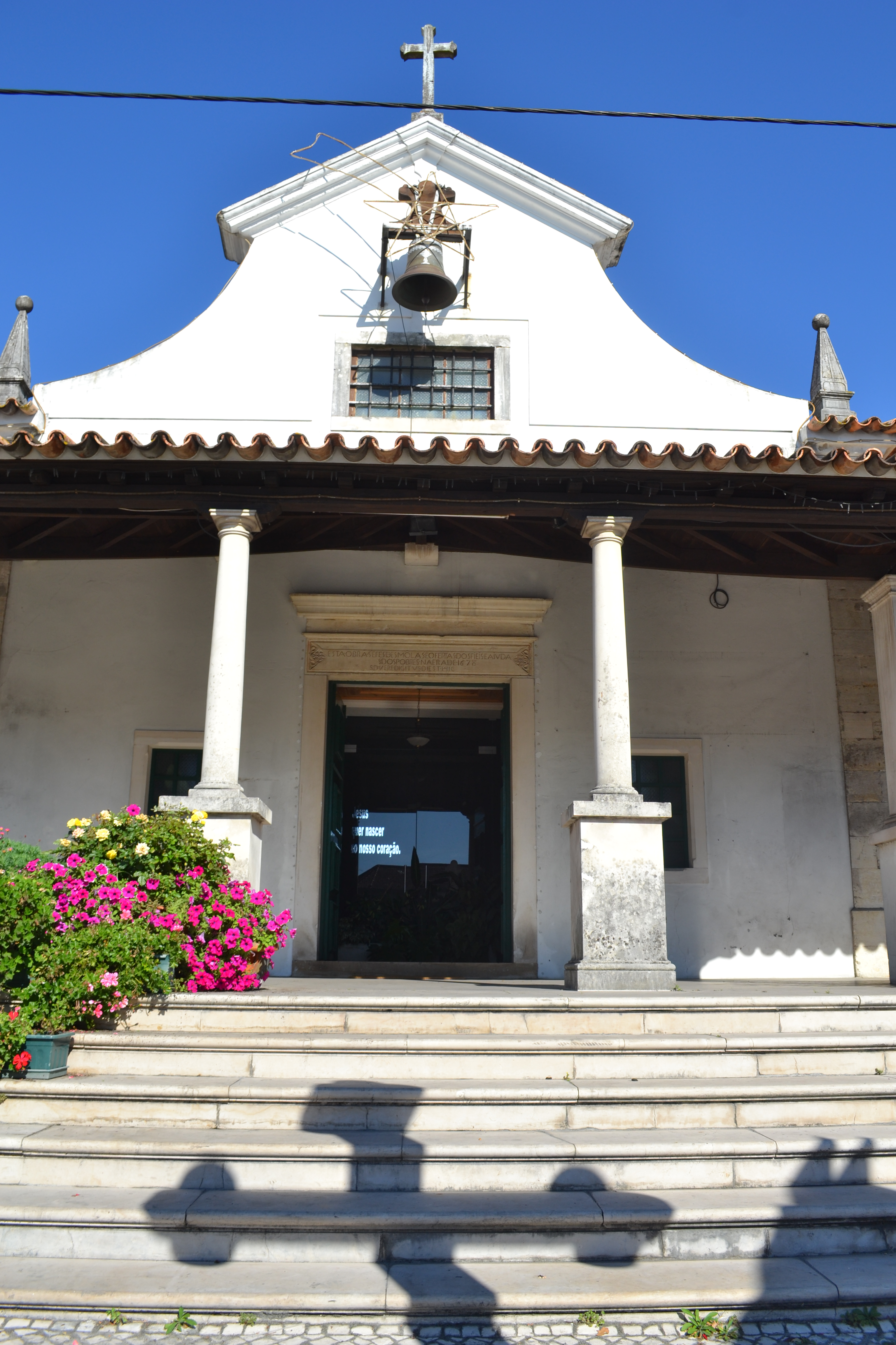 Frente